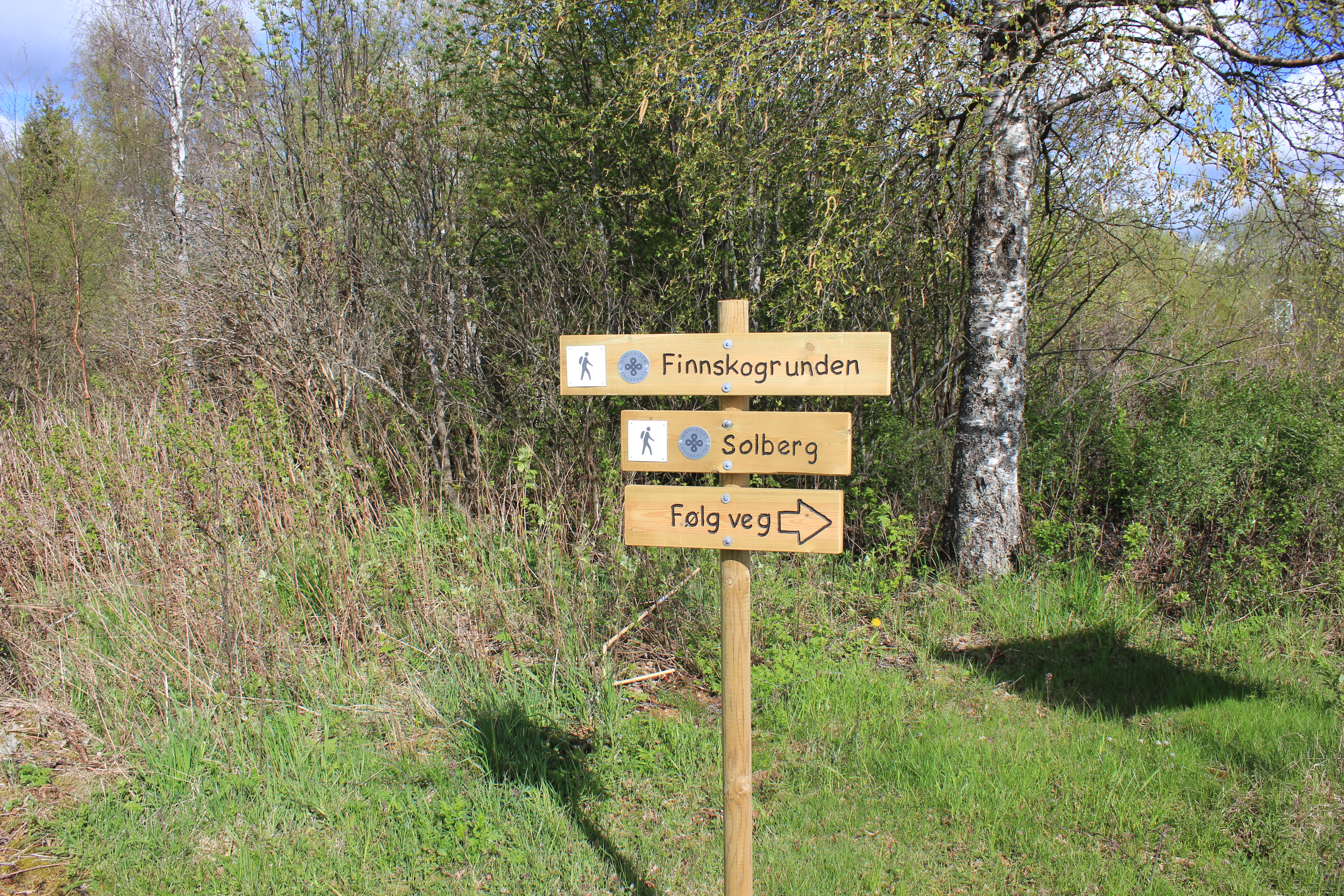 Fra Finnskogen